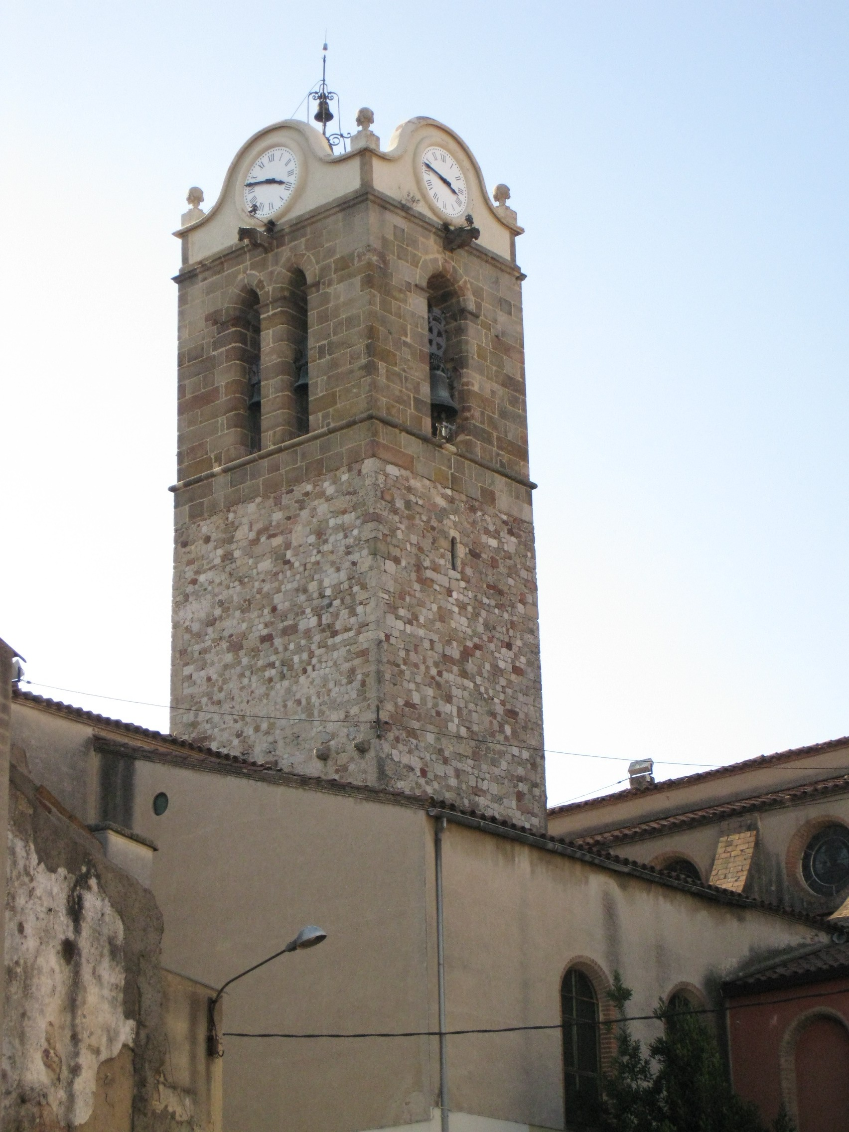 Església de Sant Vicenç (Mollet del Vallès)